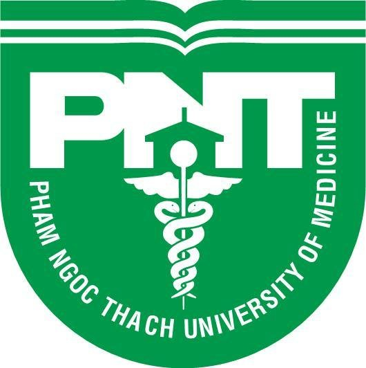 Phù hiệu trường đại học y khoa Phạm Ngọc Thạch phiên bản tiếng Anh